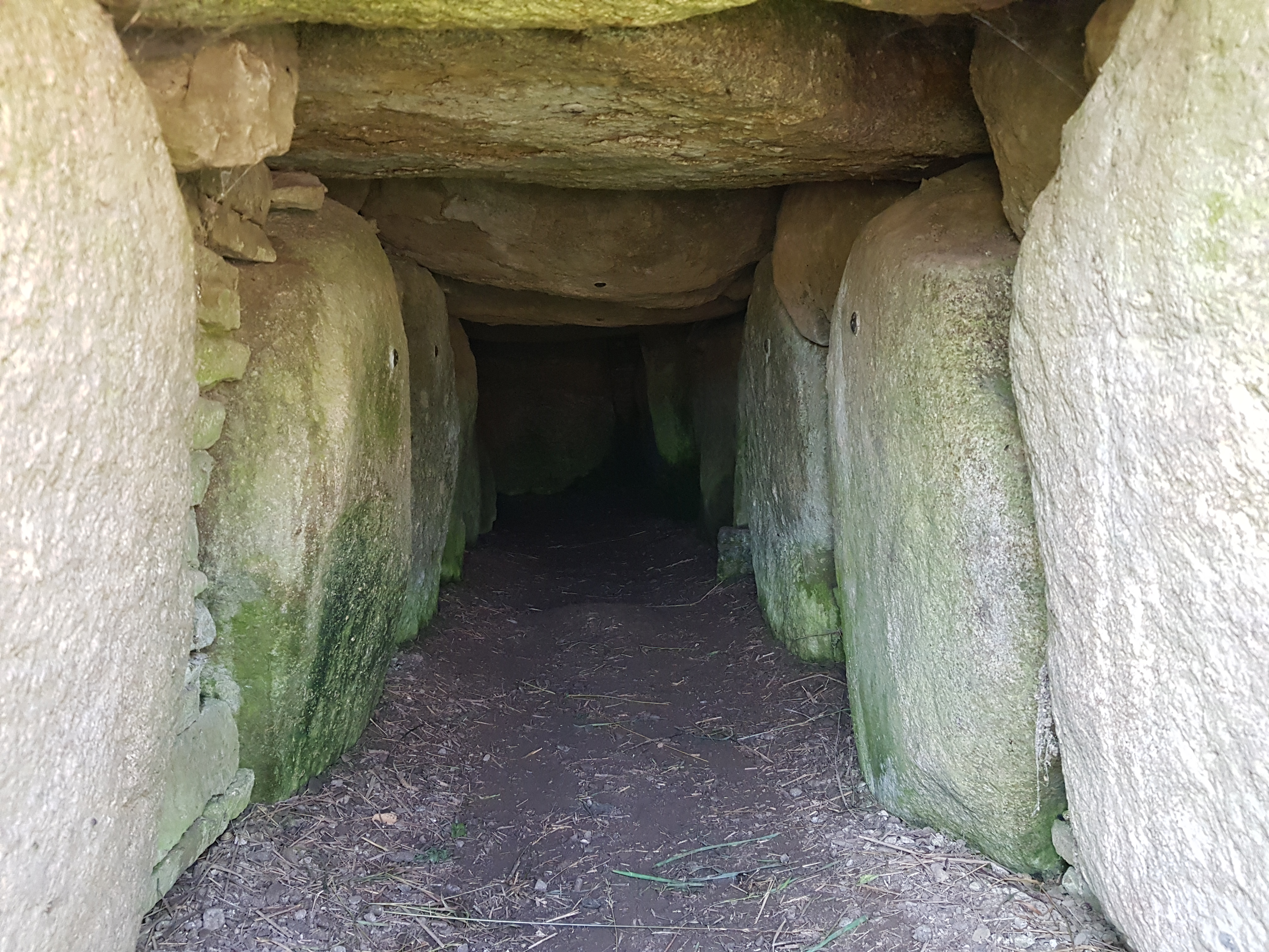 Langdysse von Vasagård (Grabhügel), Langgrab (innen), Bornholm